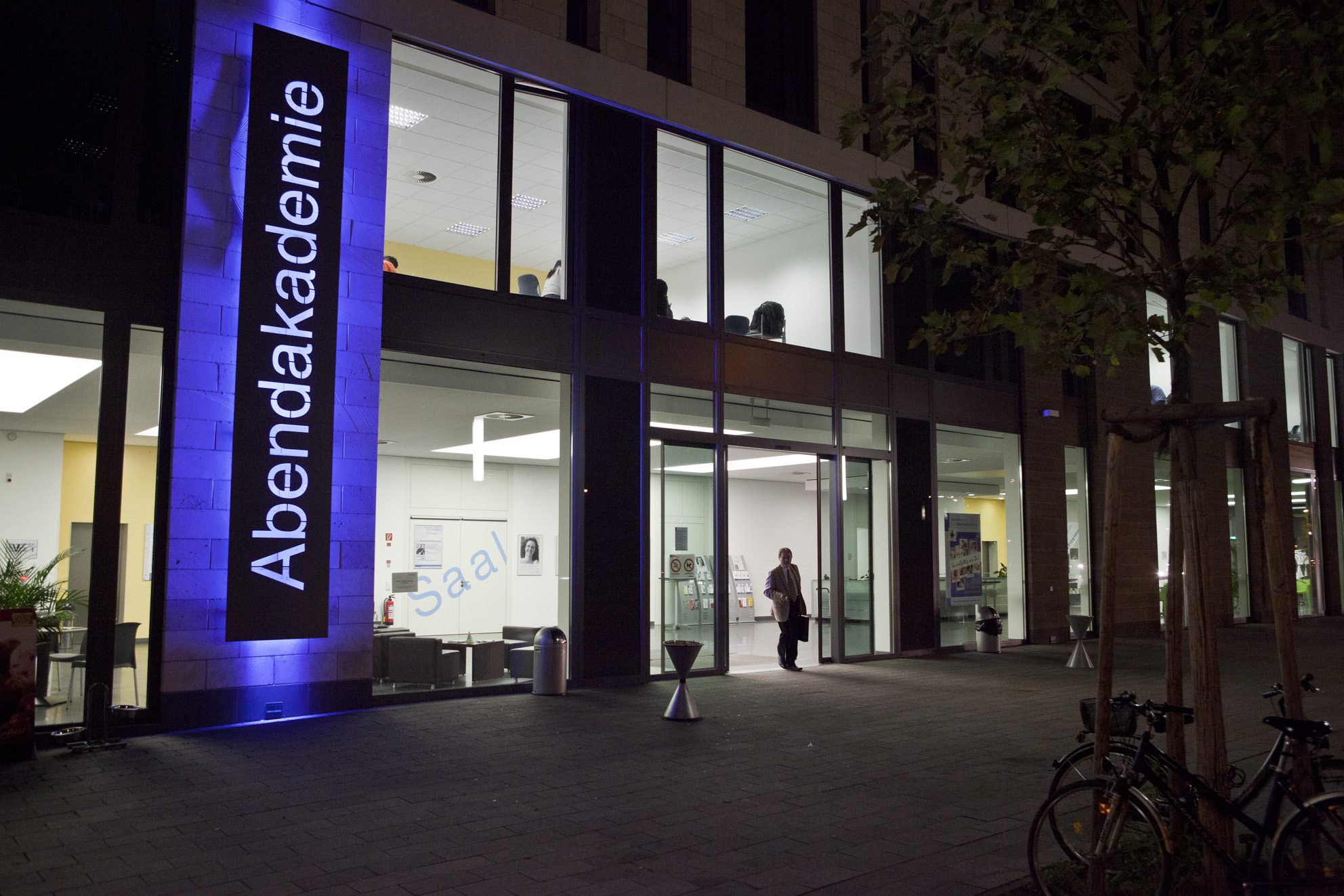 Haupteingang Abendakademie Mannheim